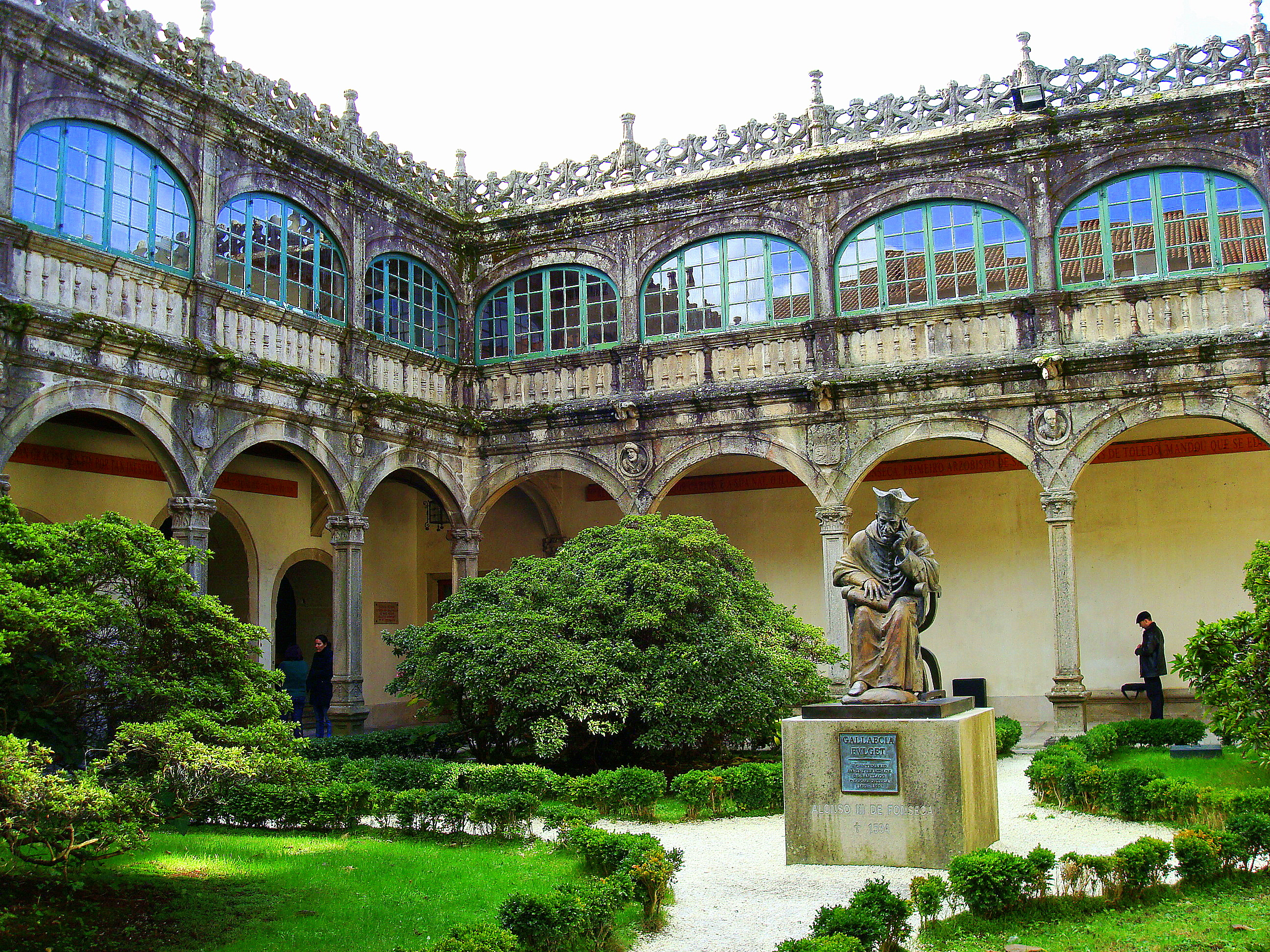 Mandado construir por el arzobispo Alonso de Fonseca en 1544.